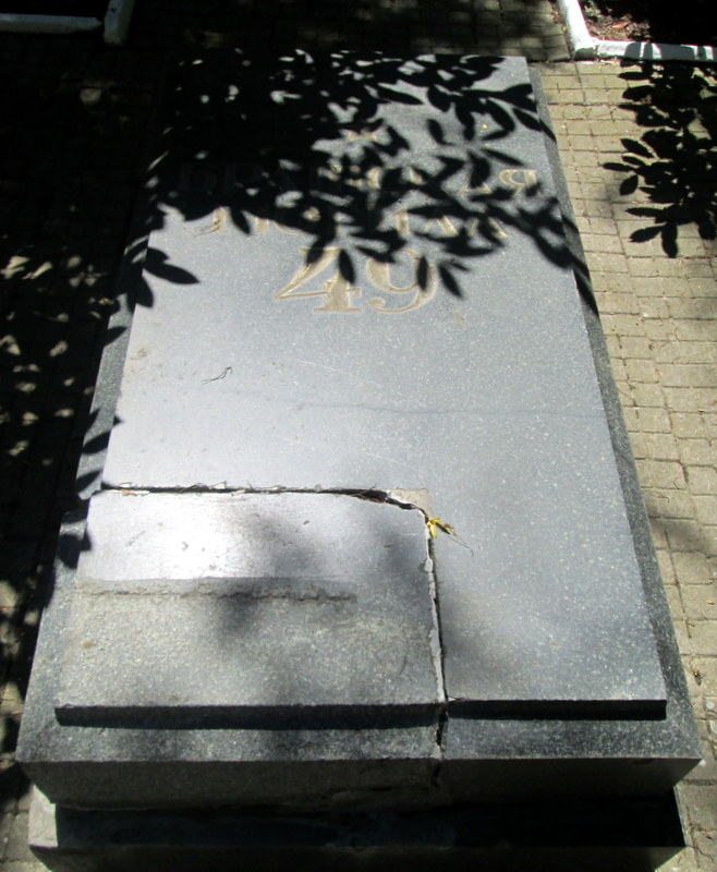 Братська могила 49 більшовиків-підпільників, 1919, перепоховання 1923, Севастополь, вулиця 5-а Бастіонна.